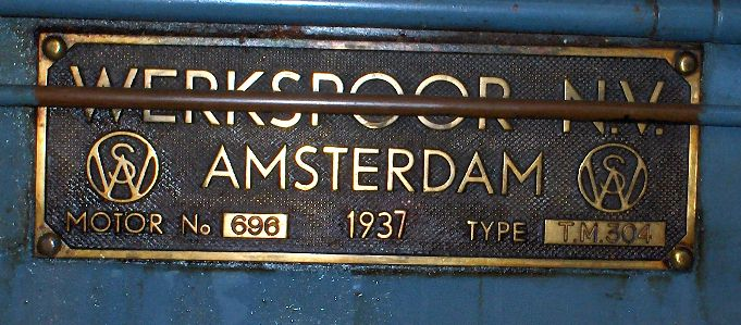 Motor van werkspoor